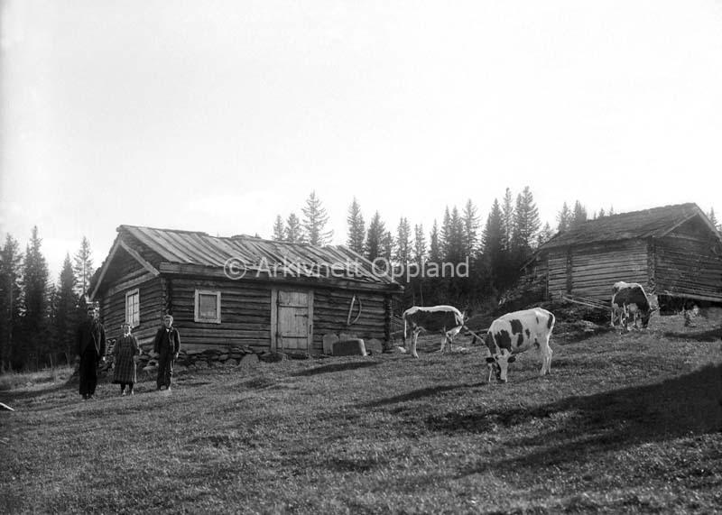 Husmannskontraktene inneholdt ofte krav om at for som ble høstet på plassen skulle brukes på plassen, og at gjødsla fra dyra skulle tilbakeføres til jorda. Bildet viser kyr som beiter på husmannsplassen Klyphaugen i Ruste i Nord-Fron.